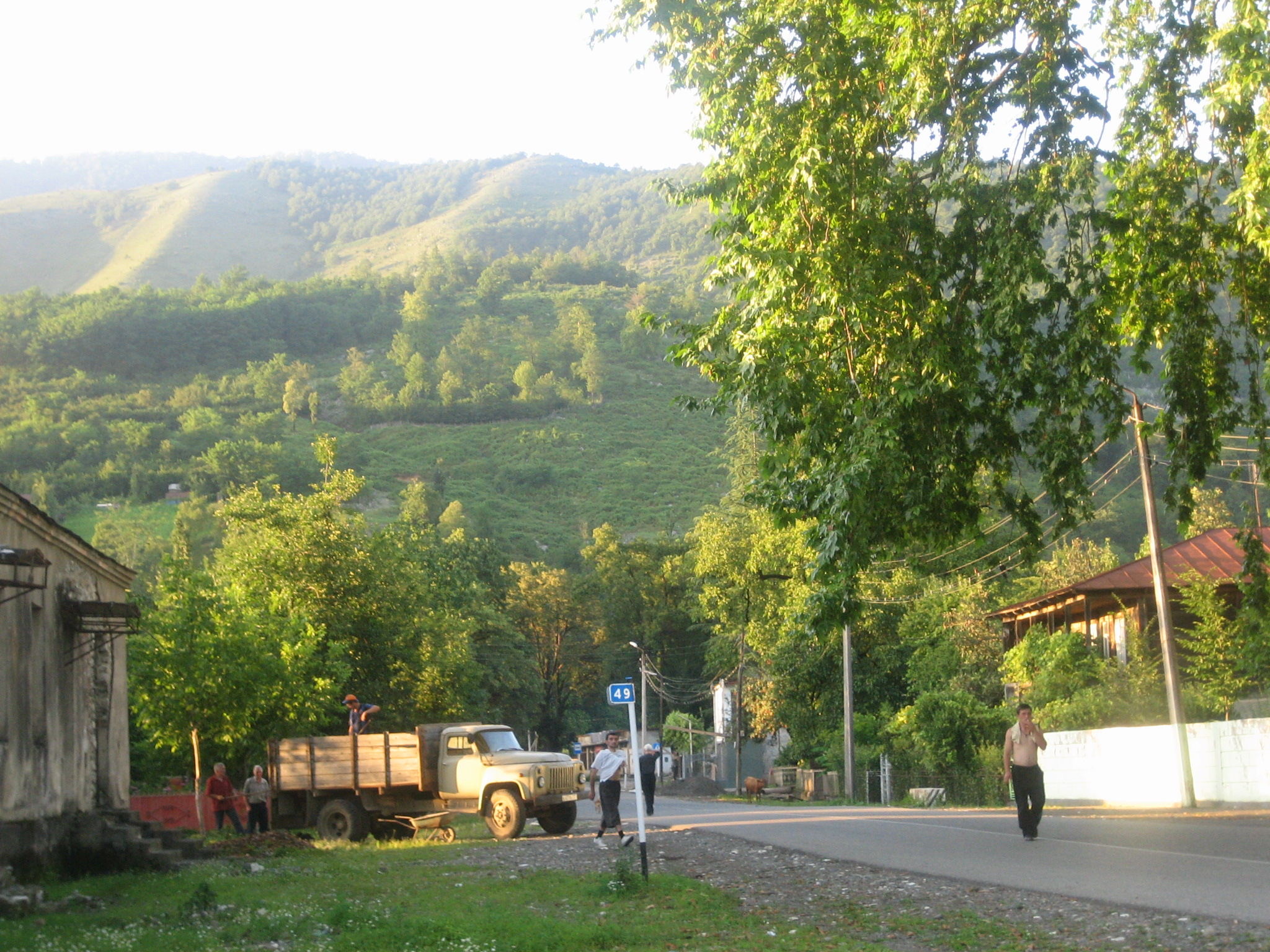 Blick entlang der Hauptstraße nach Norden zum Dorfzentrum